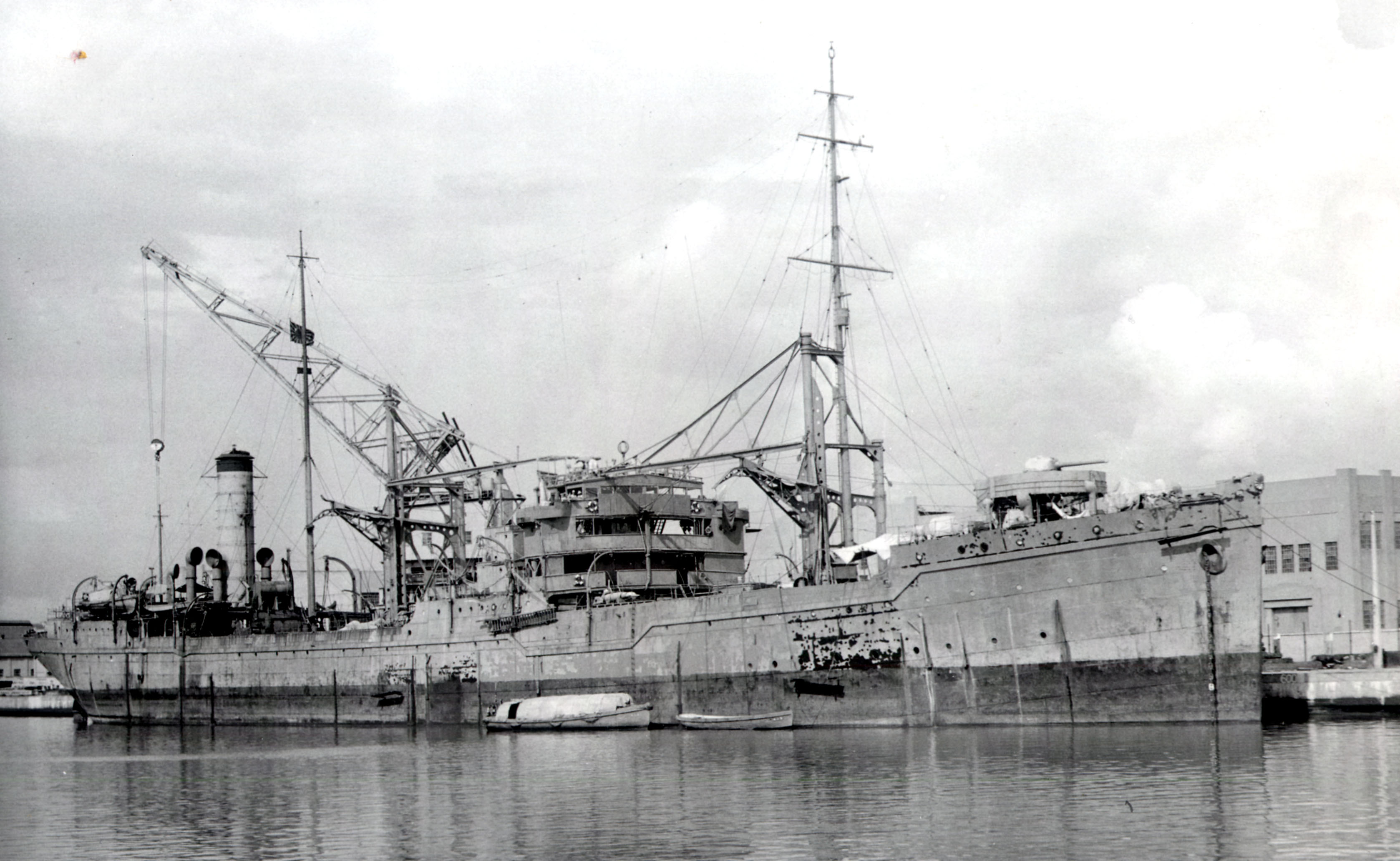 日本海軍水上機母艦「能登呂 修理のため、シンガポール・セレター軍港内に停泊中の写真。